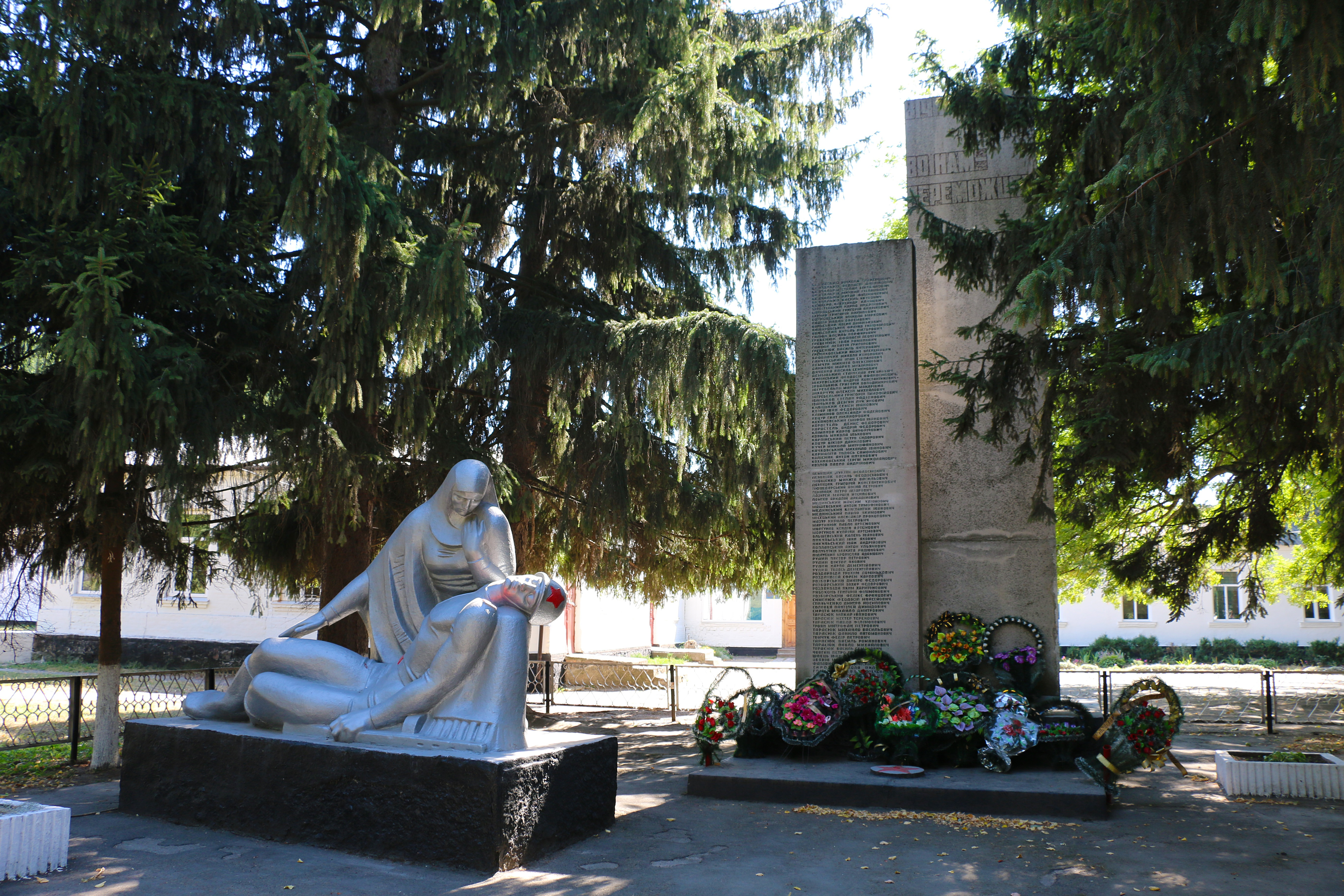 Пам’ятник 108 воїнам – односельчанам, загиблим на фронтах ВВВ, Медвеже Вушко, біля школи